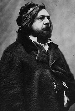 Théophile Gautier, foto av Félix Nadar.